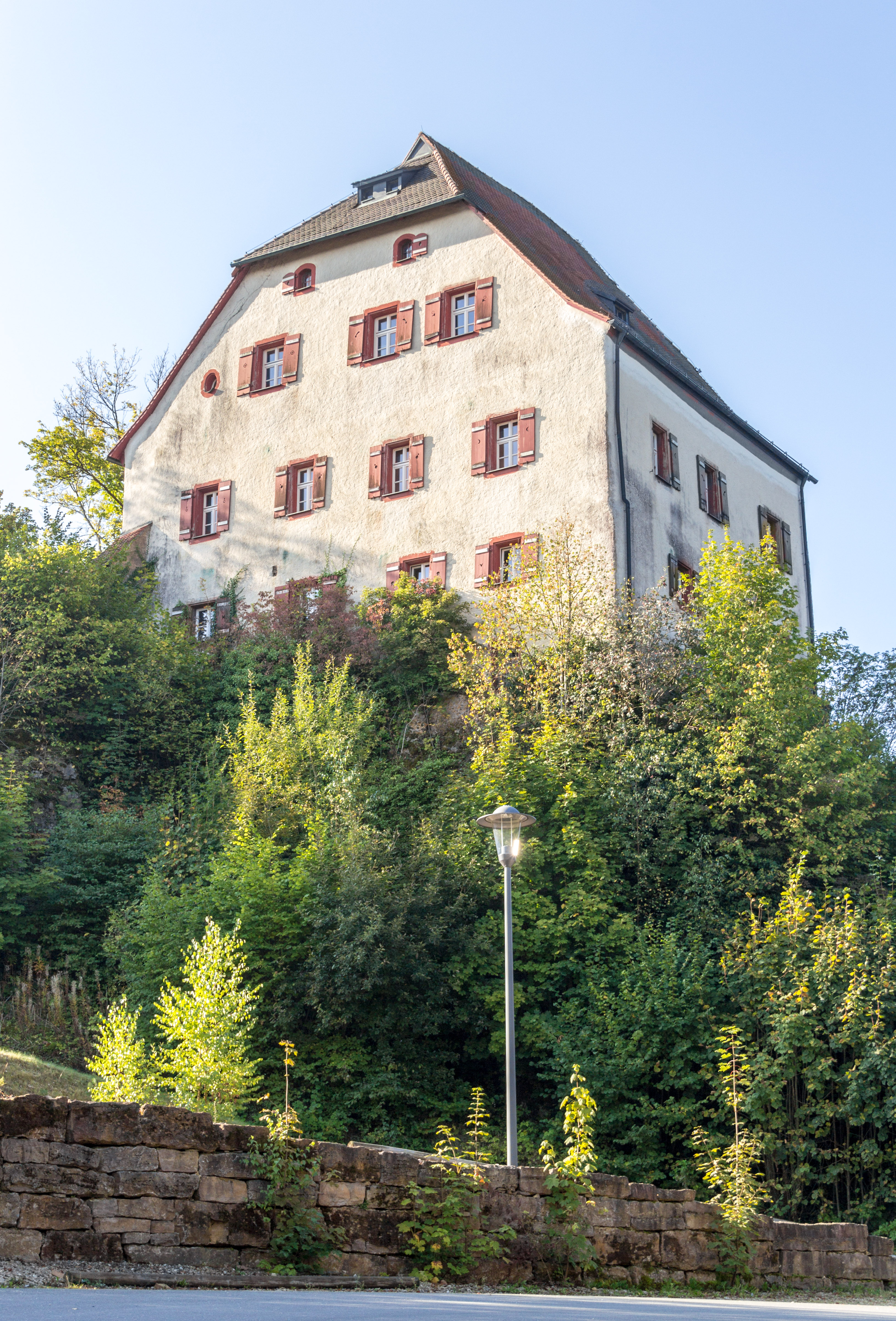 Burg, Grundmauern der Anlage, 12. bis 14. Jahrhundert, spätmittelalterliches dreigeschossiges Kasernengebäude, 1633, im Kern 16. Jahrhundert; mit Ausstattung, Burgbefestigung, Kalkstein, wohl spätmittelalterlich, HartensteinThis is a photograph of an architectural monument.